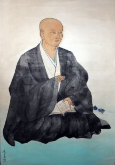 北条幻庵(長綱)の肖像。